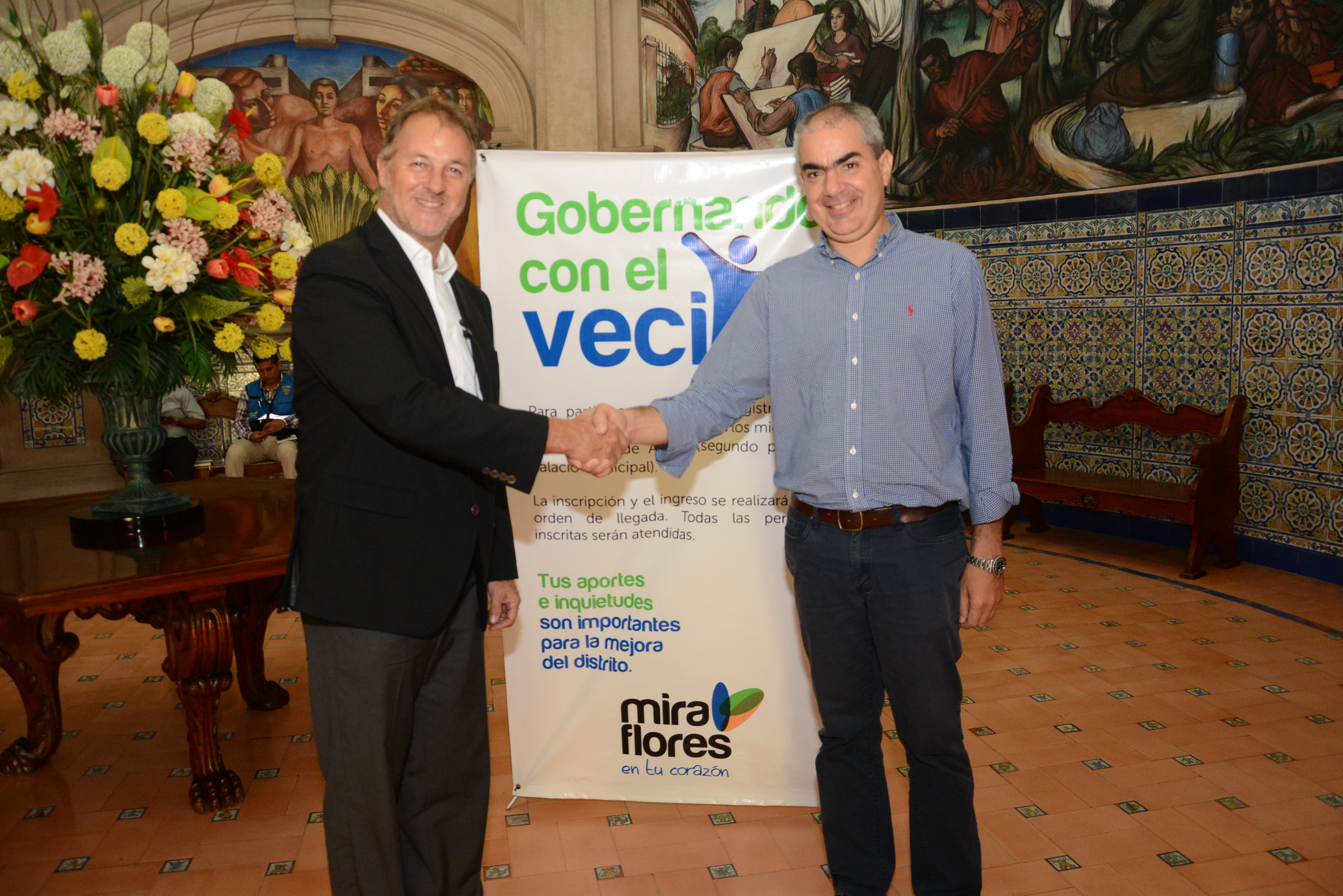 Alcalde San Isidro Manuel Velarde visita las Audiencias Vecinales en Miraflores. Junto al alcalde Jorge Muñoz Wells.